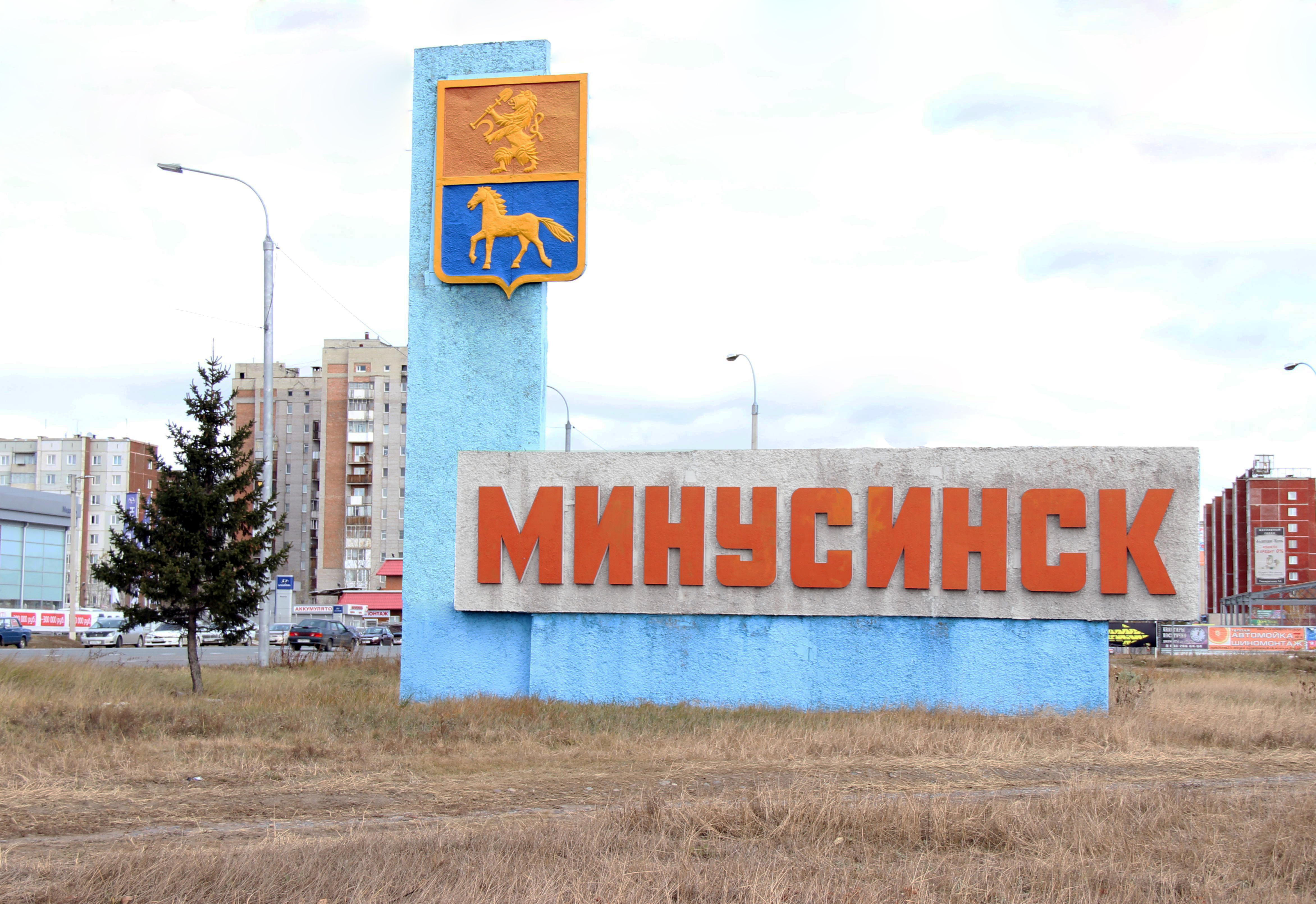 Стела на въезде в город Минусинск